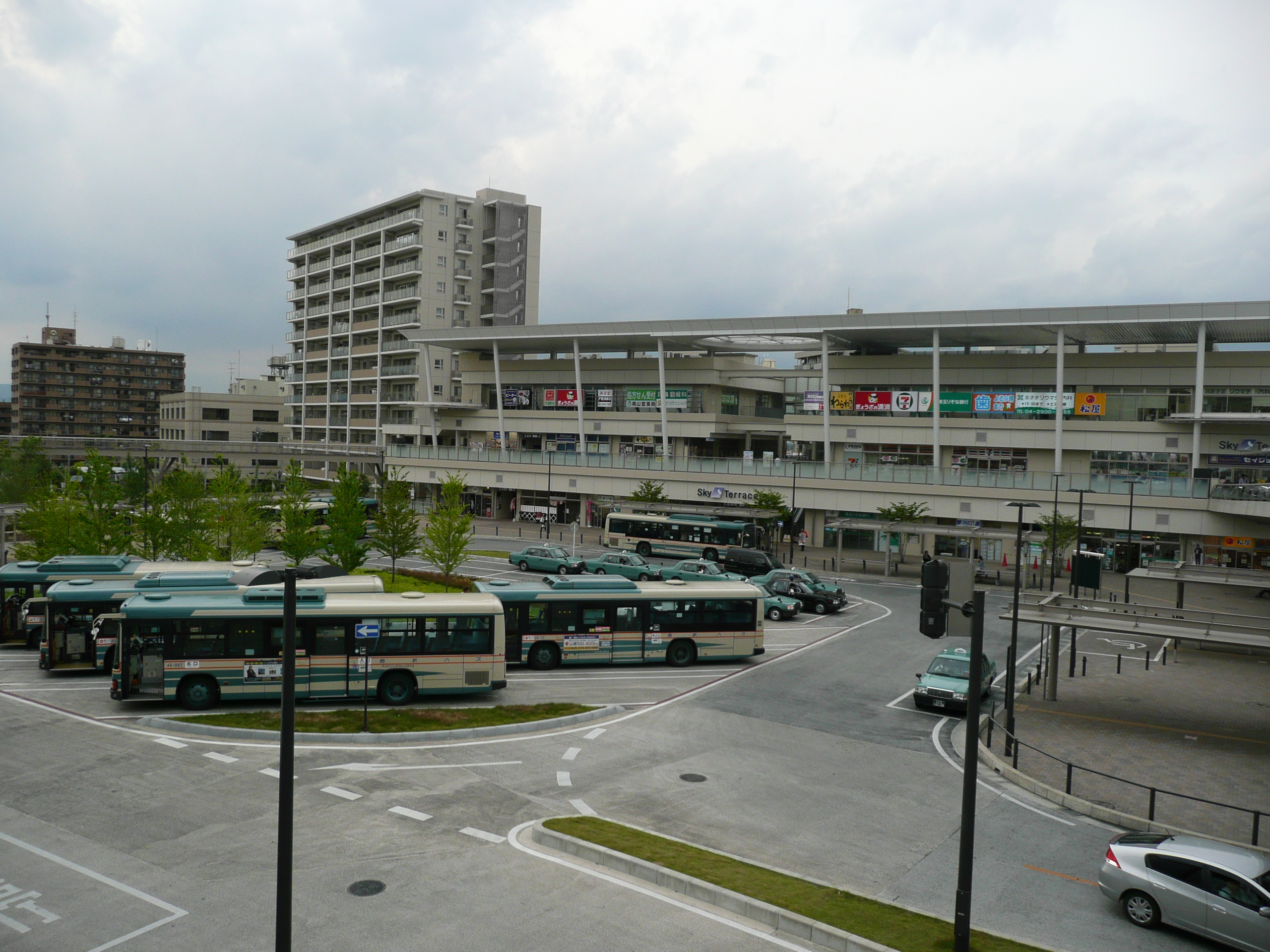 狭山市駅西口駅前広場